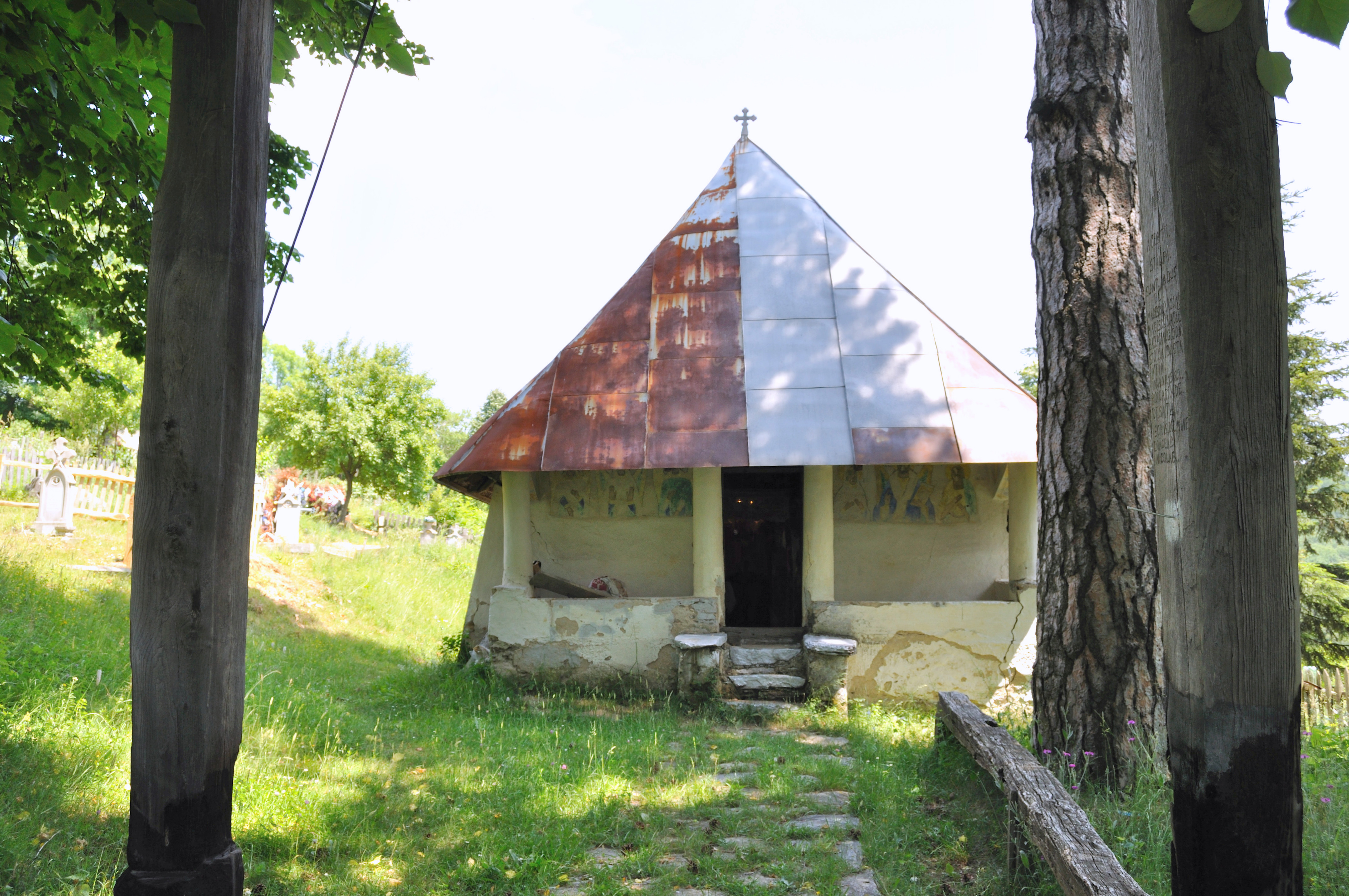 Biserica de lemn „Sfântul Gheorghe”, sat Turtaba, județ Mehedinți 01